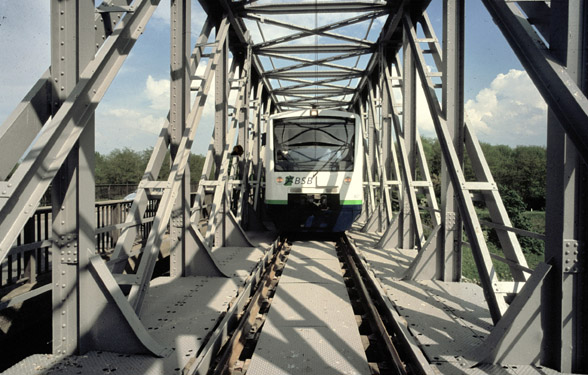 Automotrice de la BSB sur le pont entre Chalampé et Neuenburg